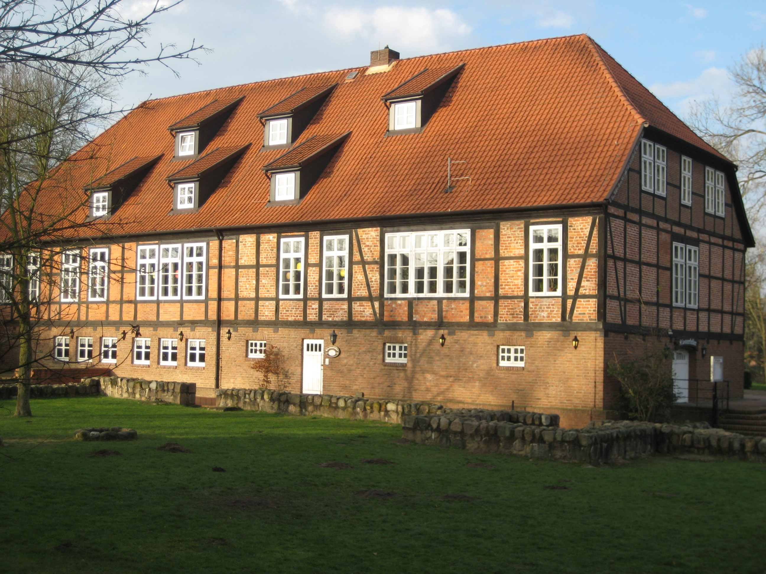 Ehemaliger Amtshof in Harsefeld auf dem früheren Klostergelände, seit 1980 Friedrich-Huth-Bibliothek. Das Gebäude wurde auf den Grundmauern des Abtshauses des Klosters Harsefeld errichtet